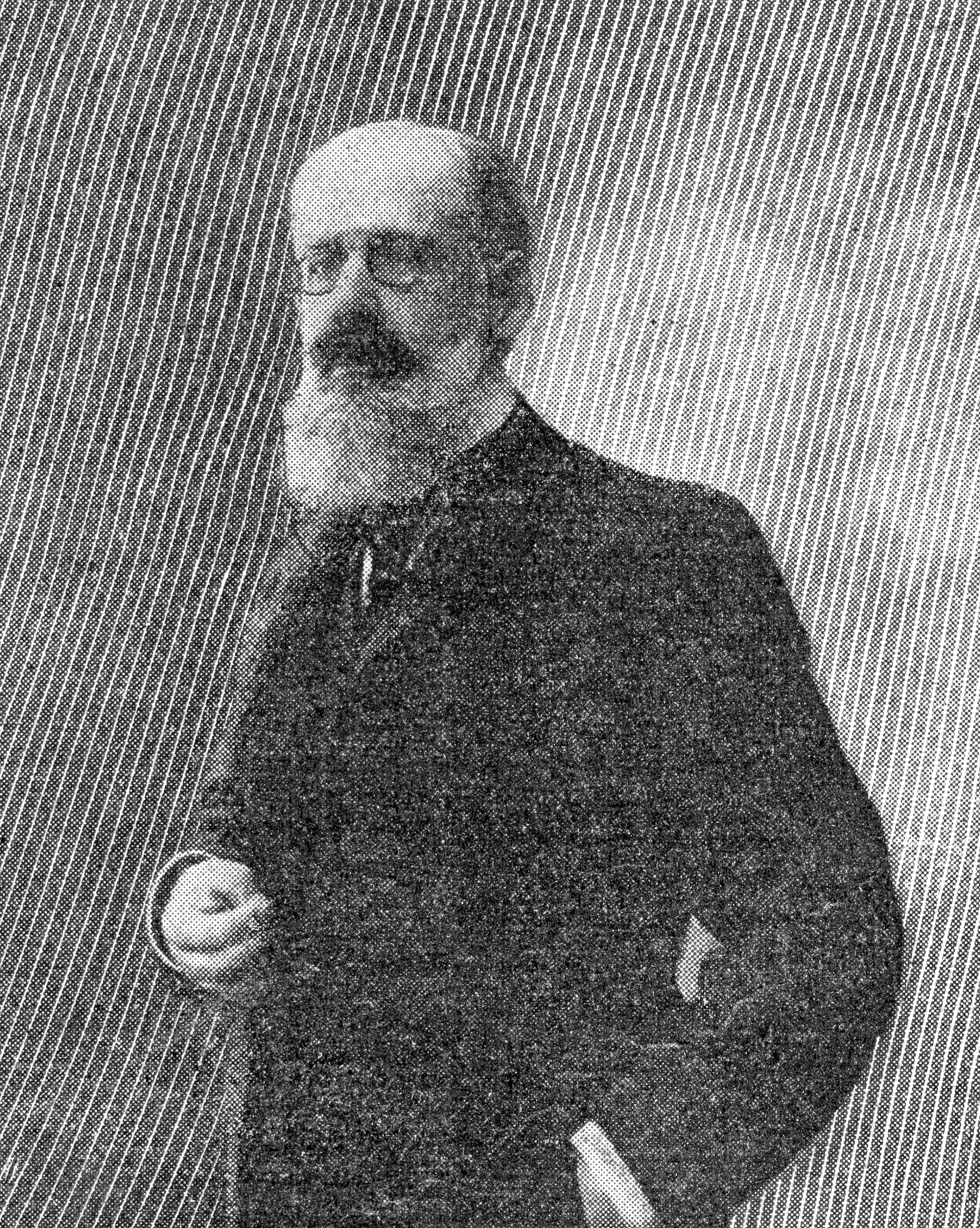 Touche à tout 1910 2eme semestre p 86 Pierre Valdagne par Henri Manuel